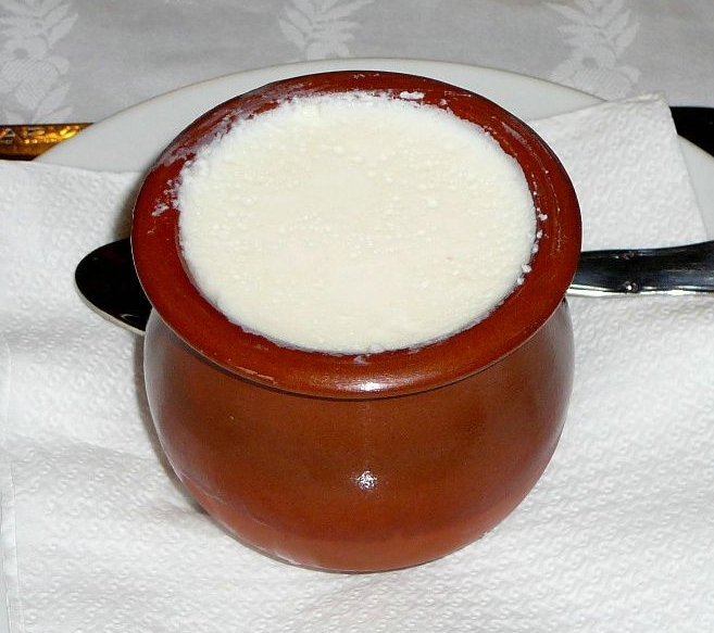 Una cuajada.